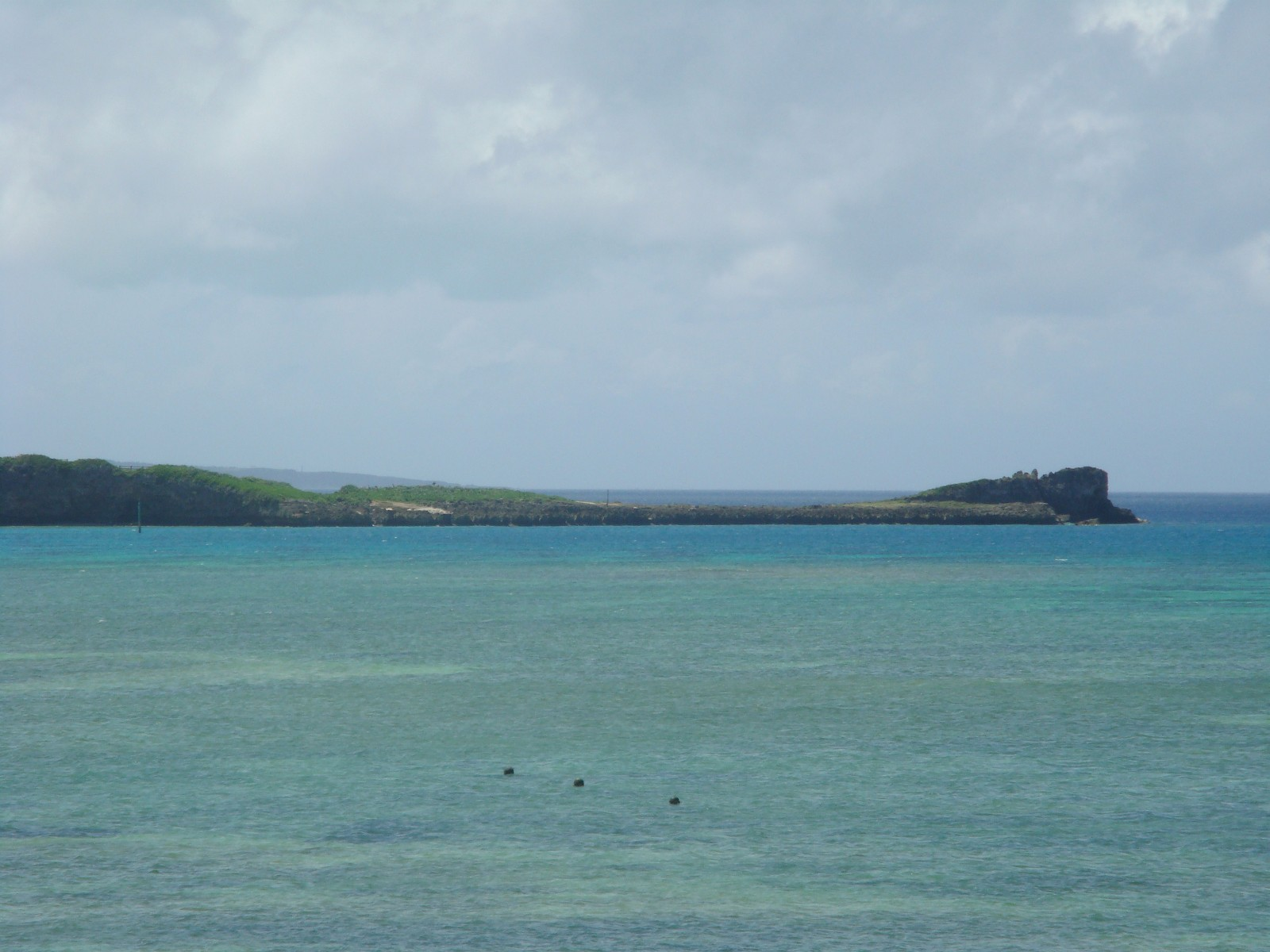 Cape Nishihennazaki, Miyako Island (Miyakojima City), Okinawa, Japan / 西平安名崎（沖縄県宮古島）